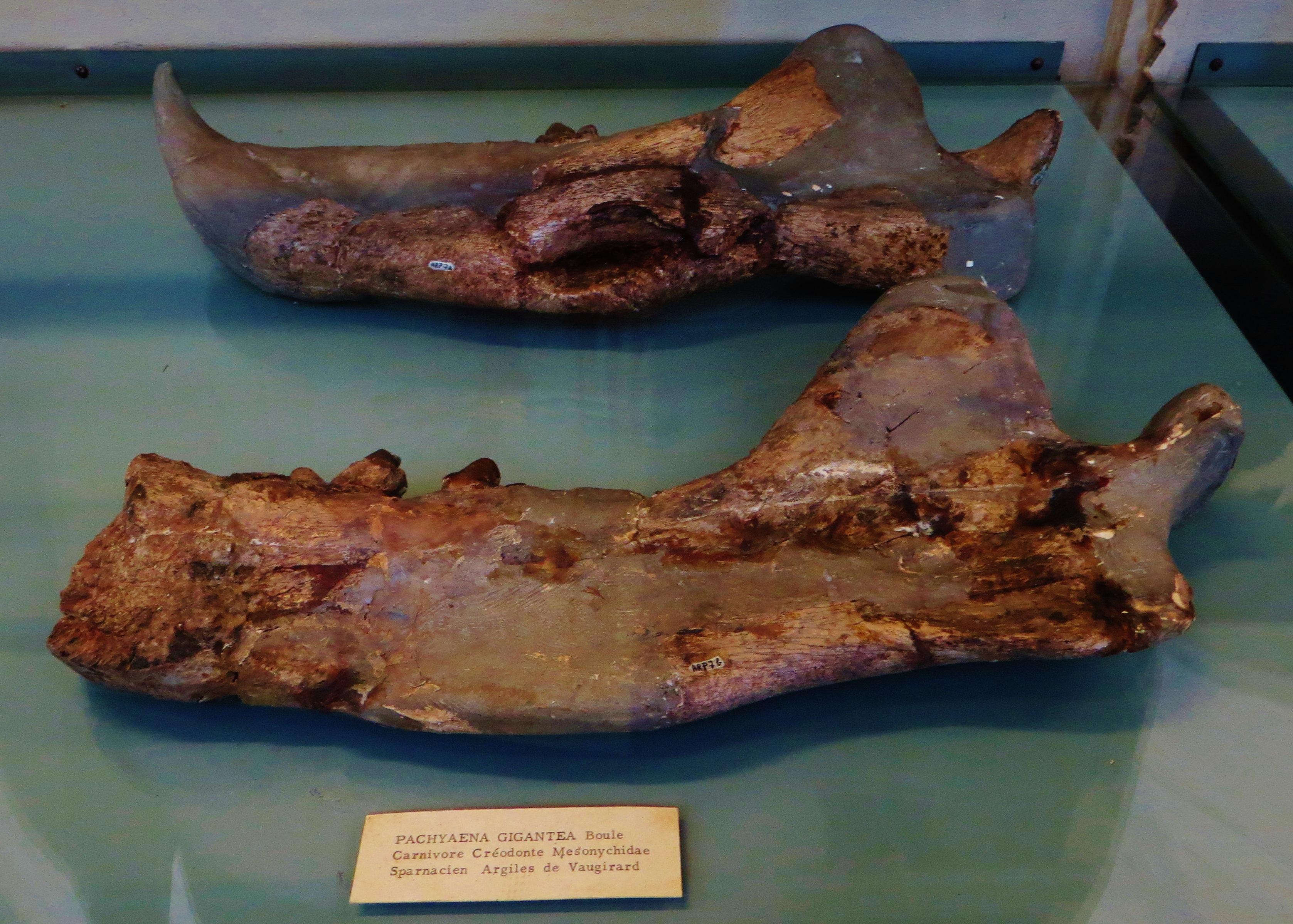 Fossil of Pachyaena, an extinct mammal- Took the photo at Musee d'Histoire Naturelle, Paris